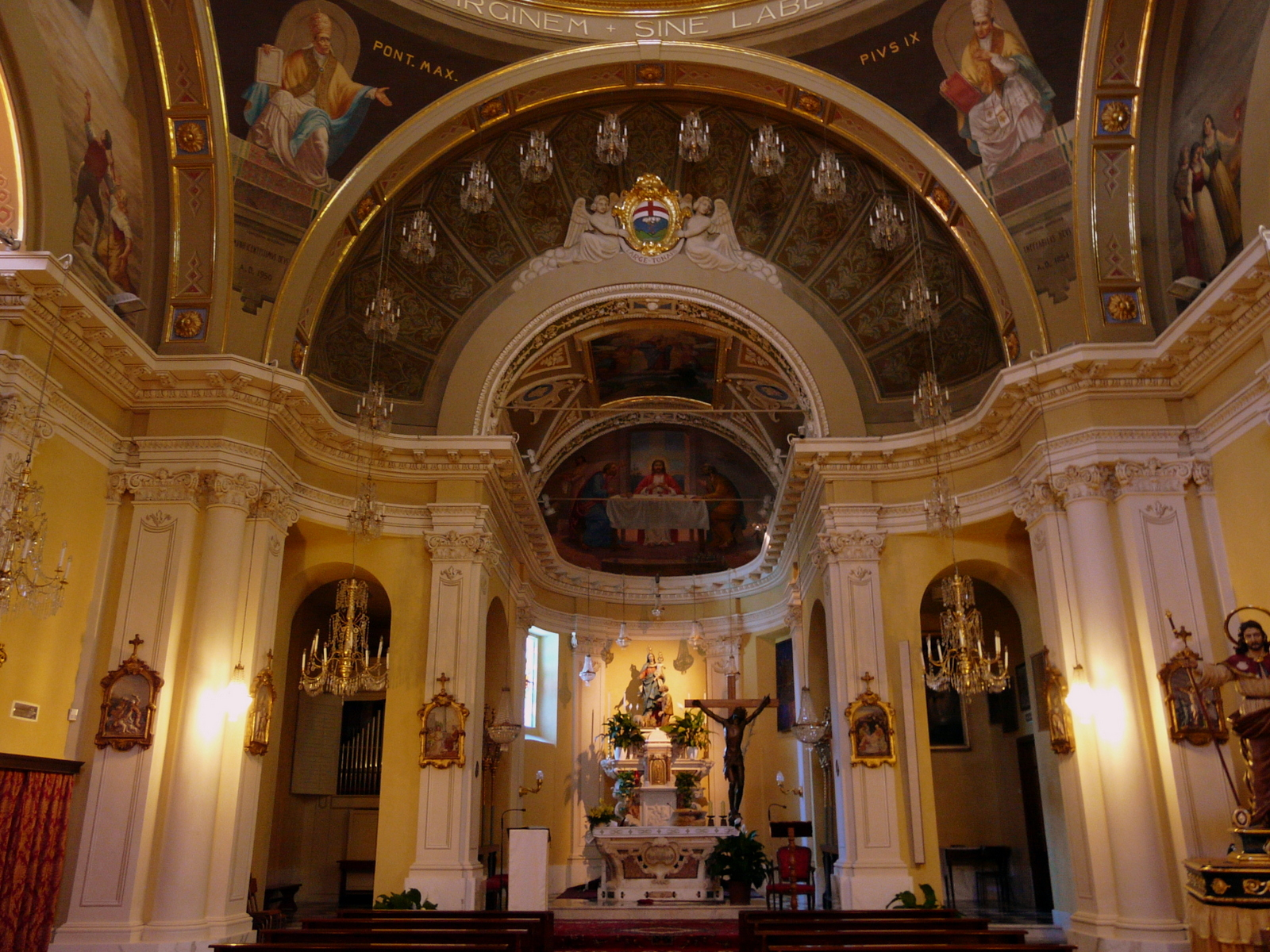 Navata maggiore del santuario di Nostra Signora della Guardia, Gattorna, Moconesi, Liguria, Italia